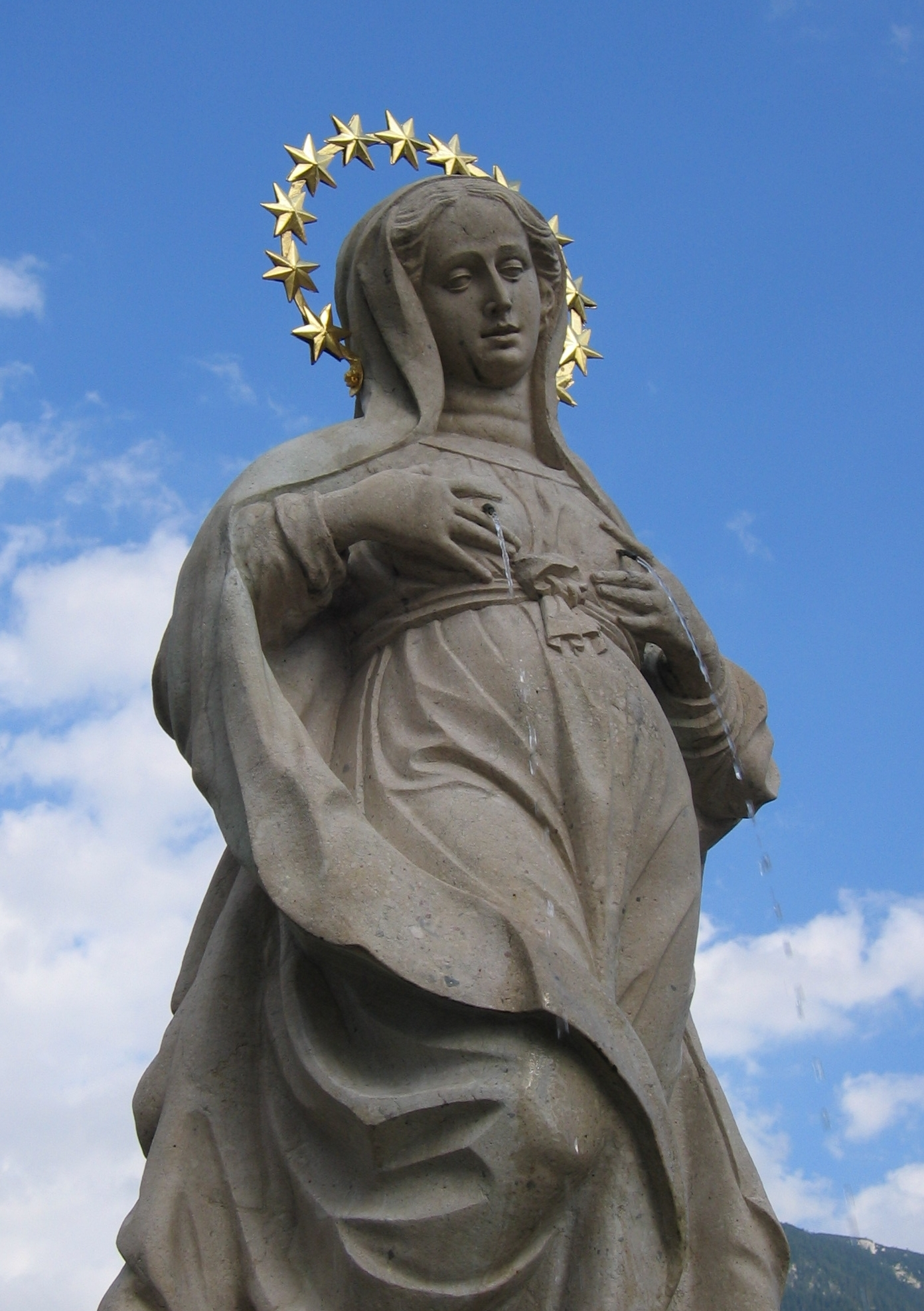 Marienbrunnen vor der Pfarrkirche Großgmain Photographed by Gakuro